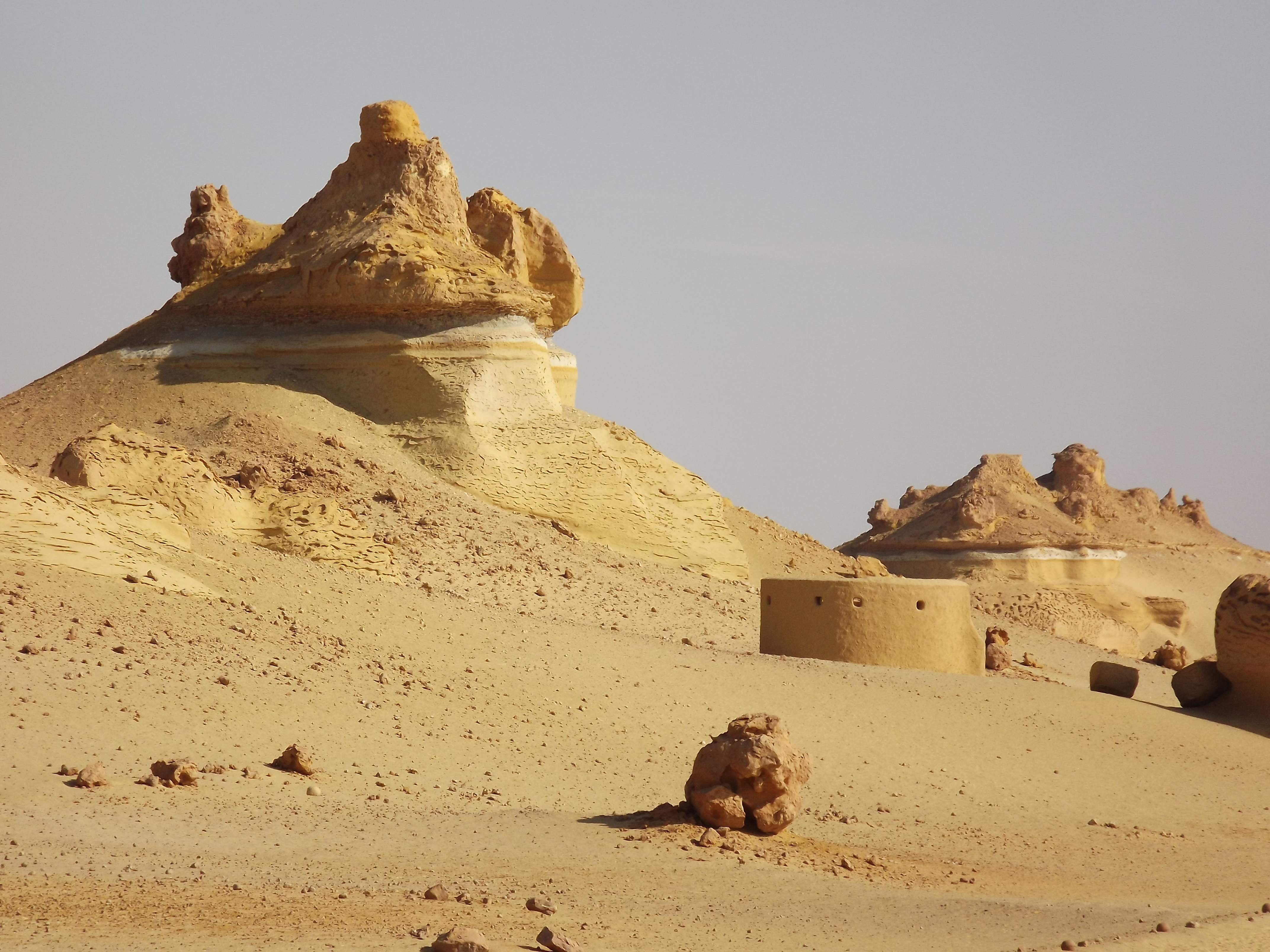 وادي الحيتان